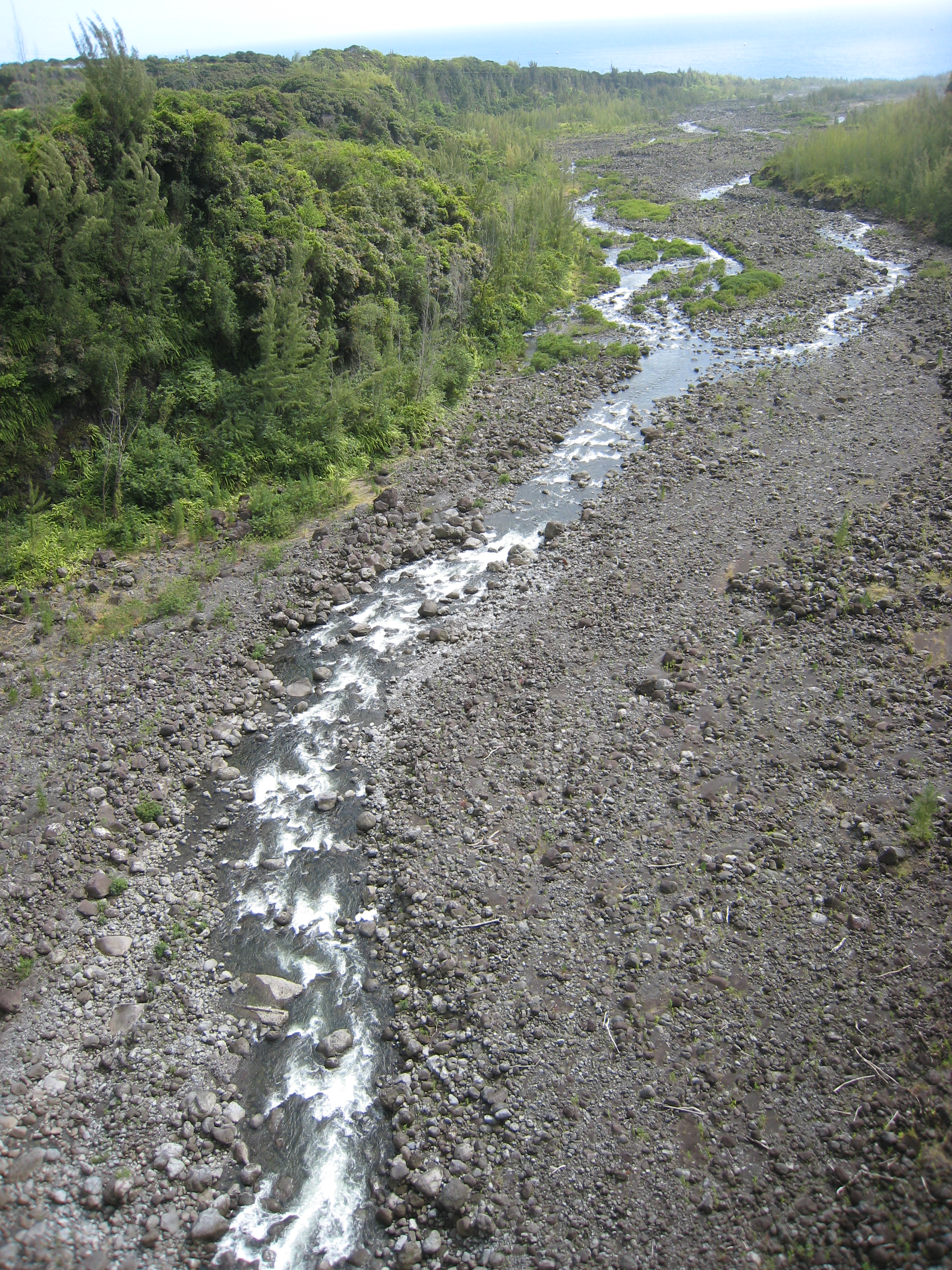 Le lit de la rivière de l'Est vu depuis le pont suspendu, à la Réunion